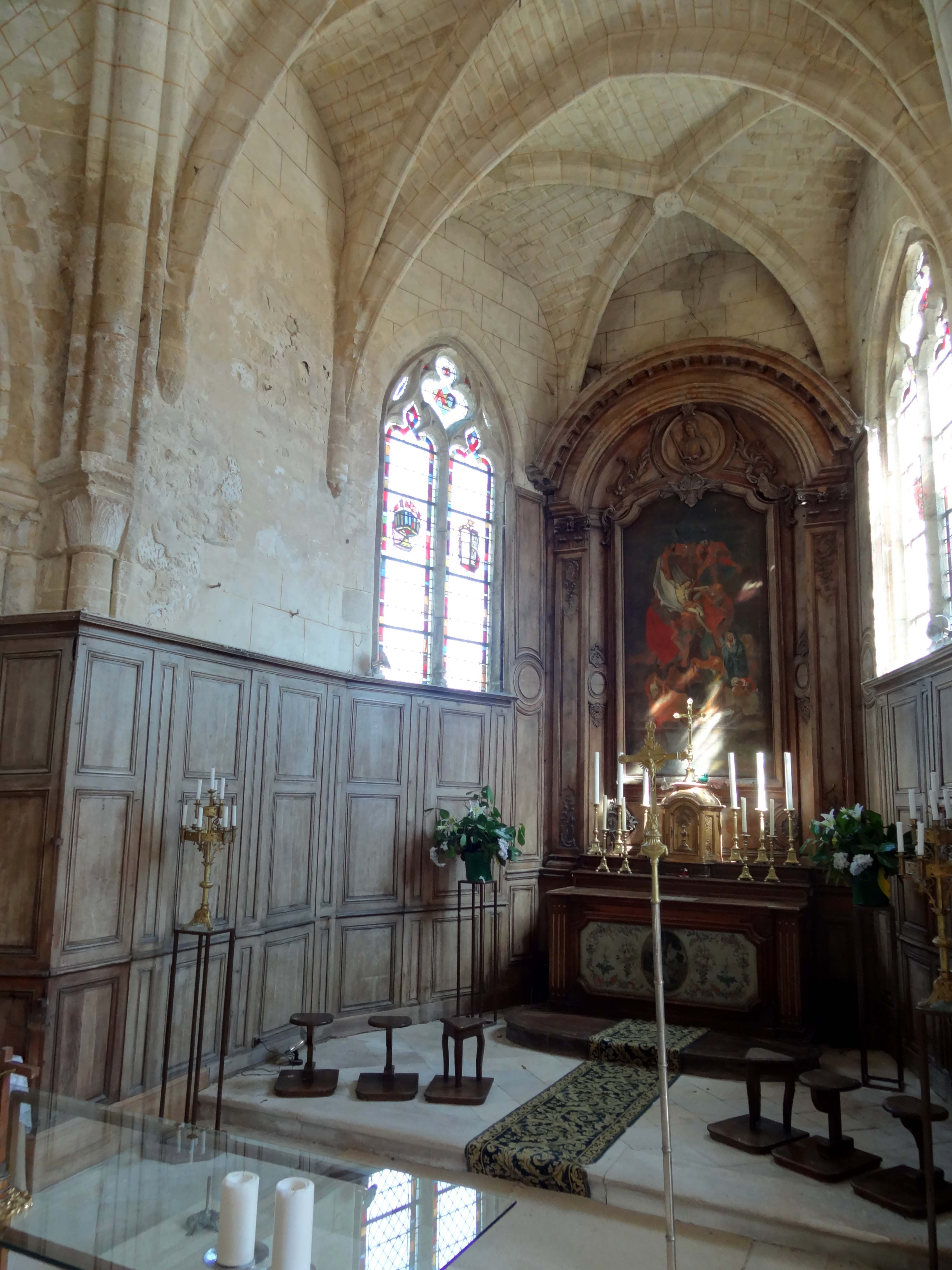 Intérieur de l'église - voir titre.